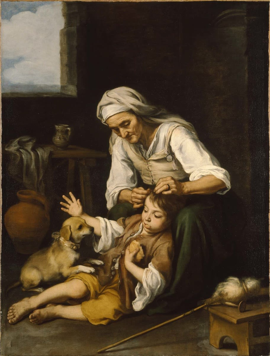 Anciana despiojando a su nieto, óleo sobre lienzo, 147 x 113 cm., Munich, Alte Pinakothek.